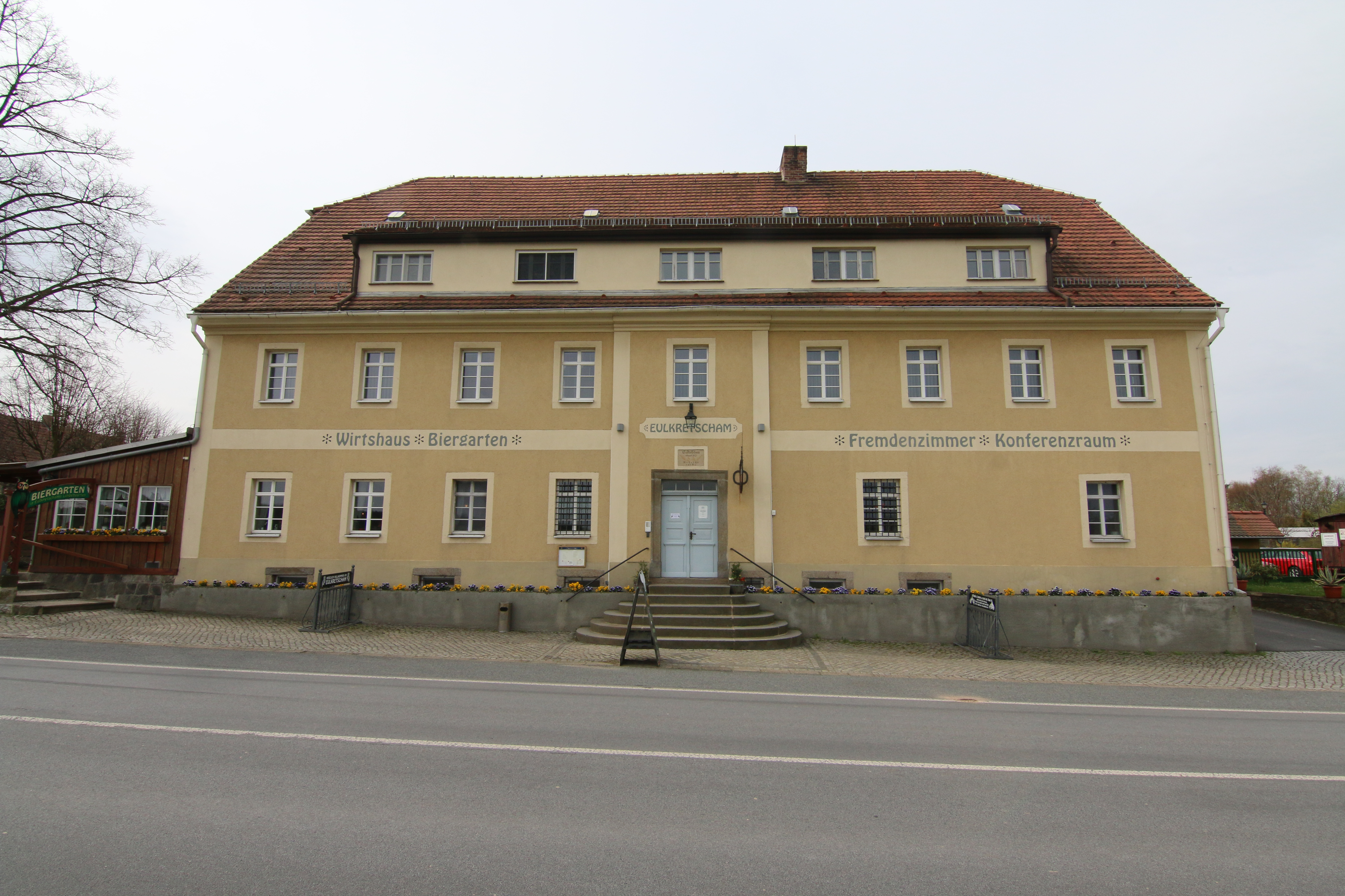 Eulkretscham (Am Stausee 4), Euldorf